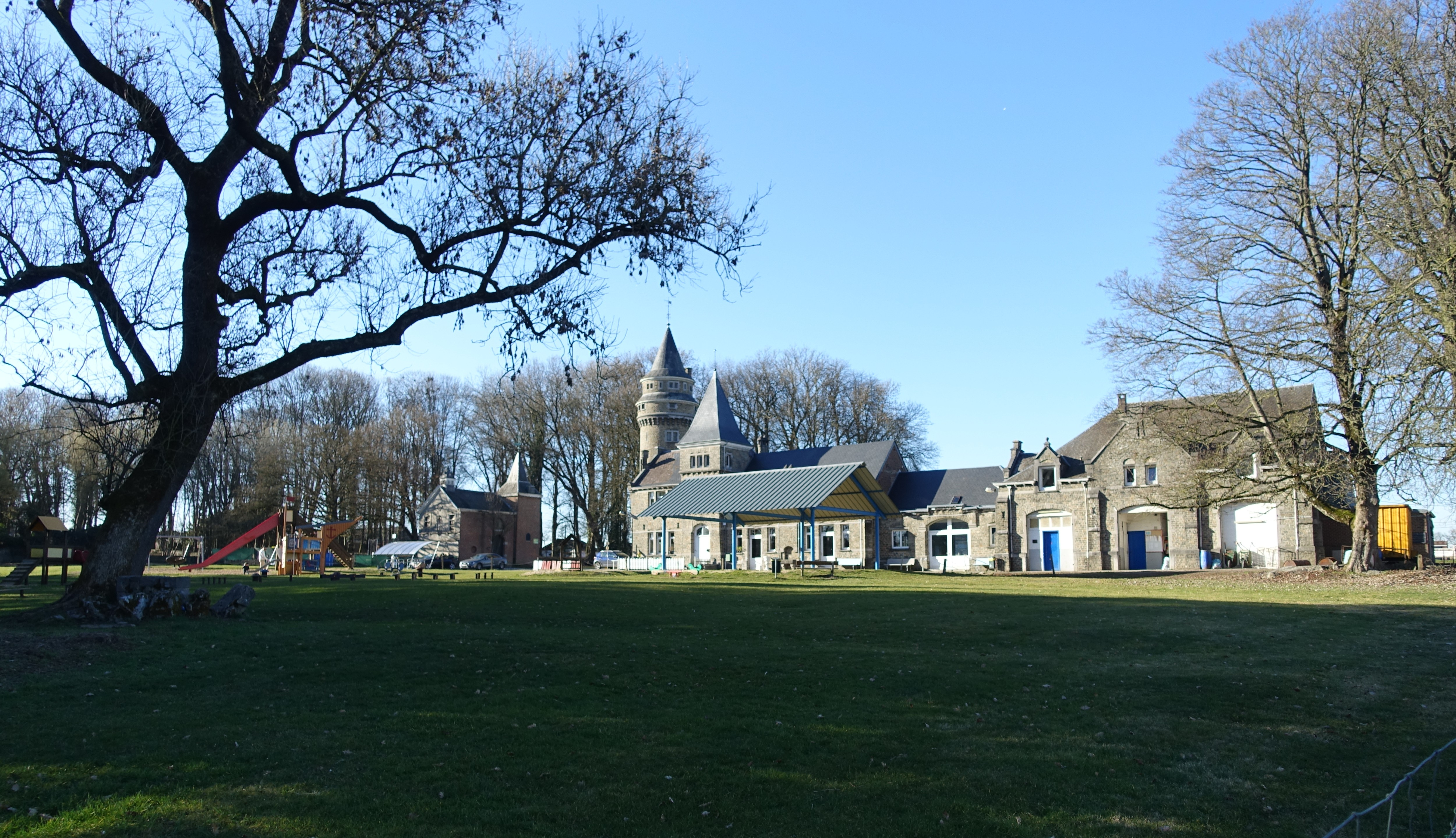 Château des Tourelles. Il ne subsistent que les dépendances et une tour datant du début du 20ème siècle. En 1962, la commune en devint propriétaire et y installa une plaine de jeux et de sports